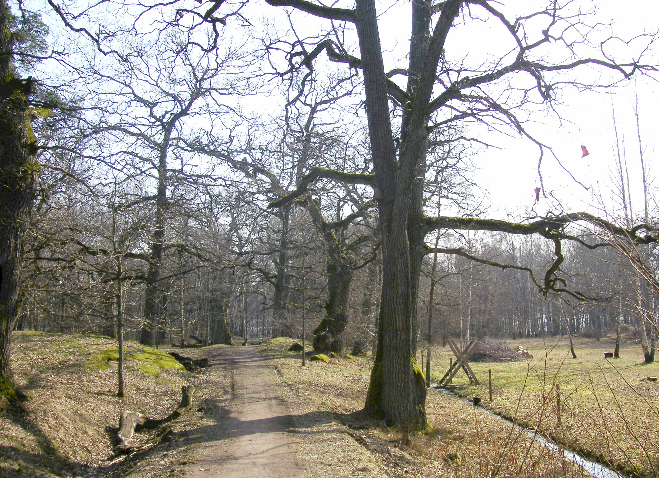 I Flatens naturreservat